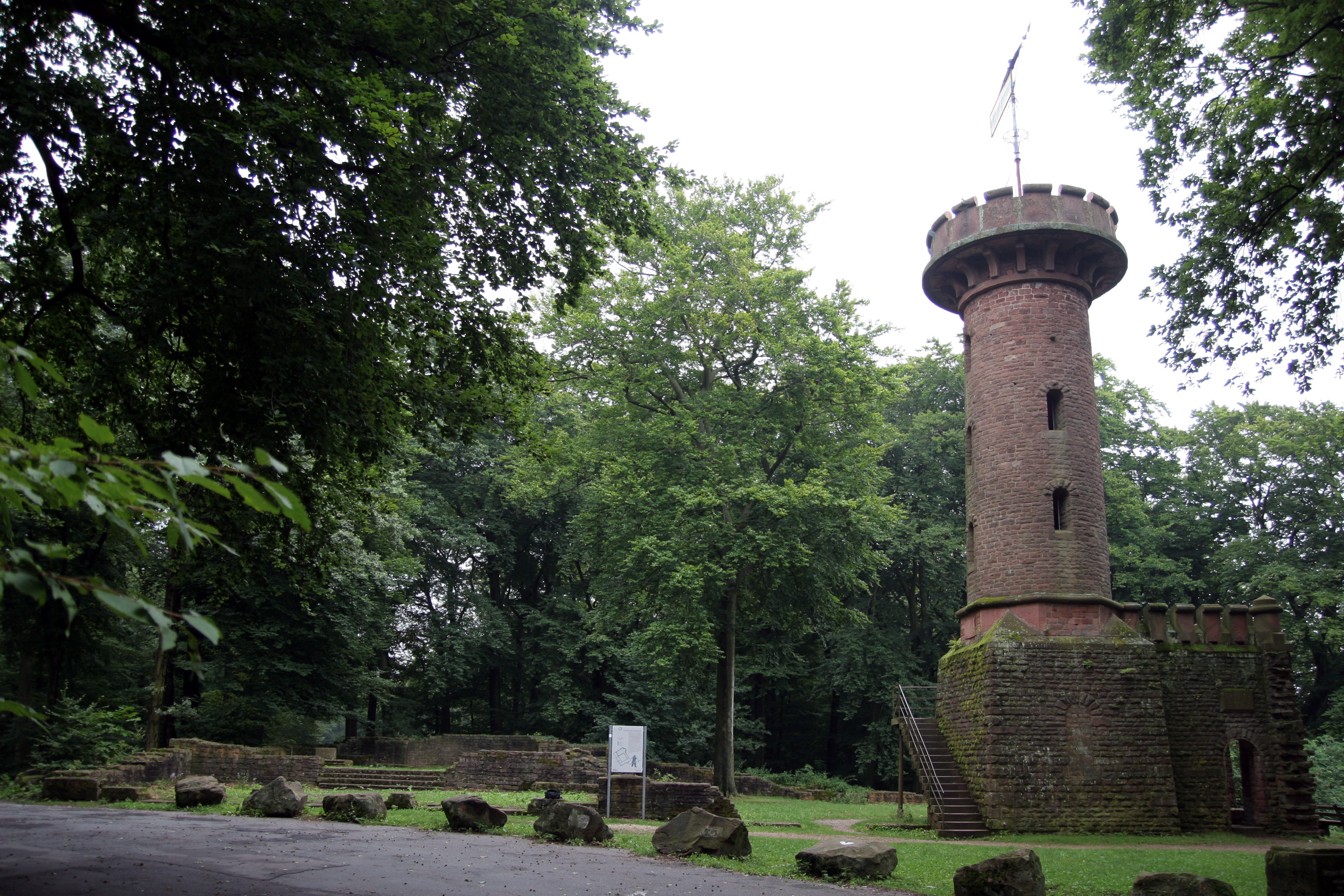 Der Heiligenbergturm auf dem Heiligenberg bei Heidelberg. Links die Reste des Stephansklosters.